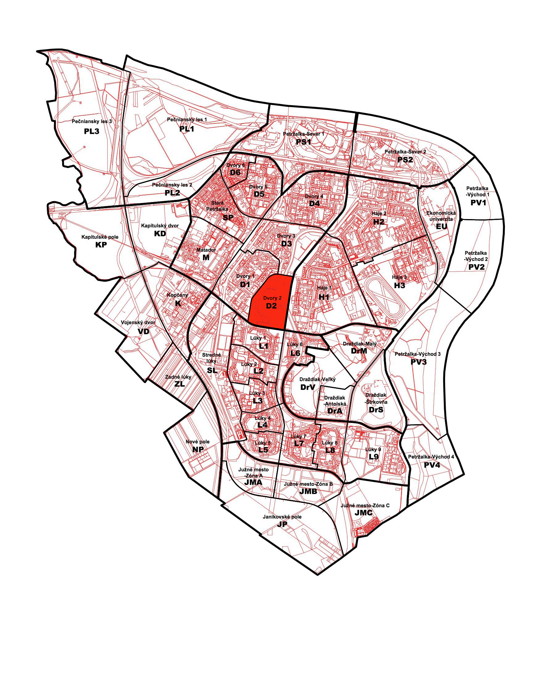 Poloha petržalskej miestnej časti